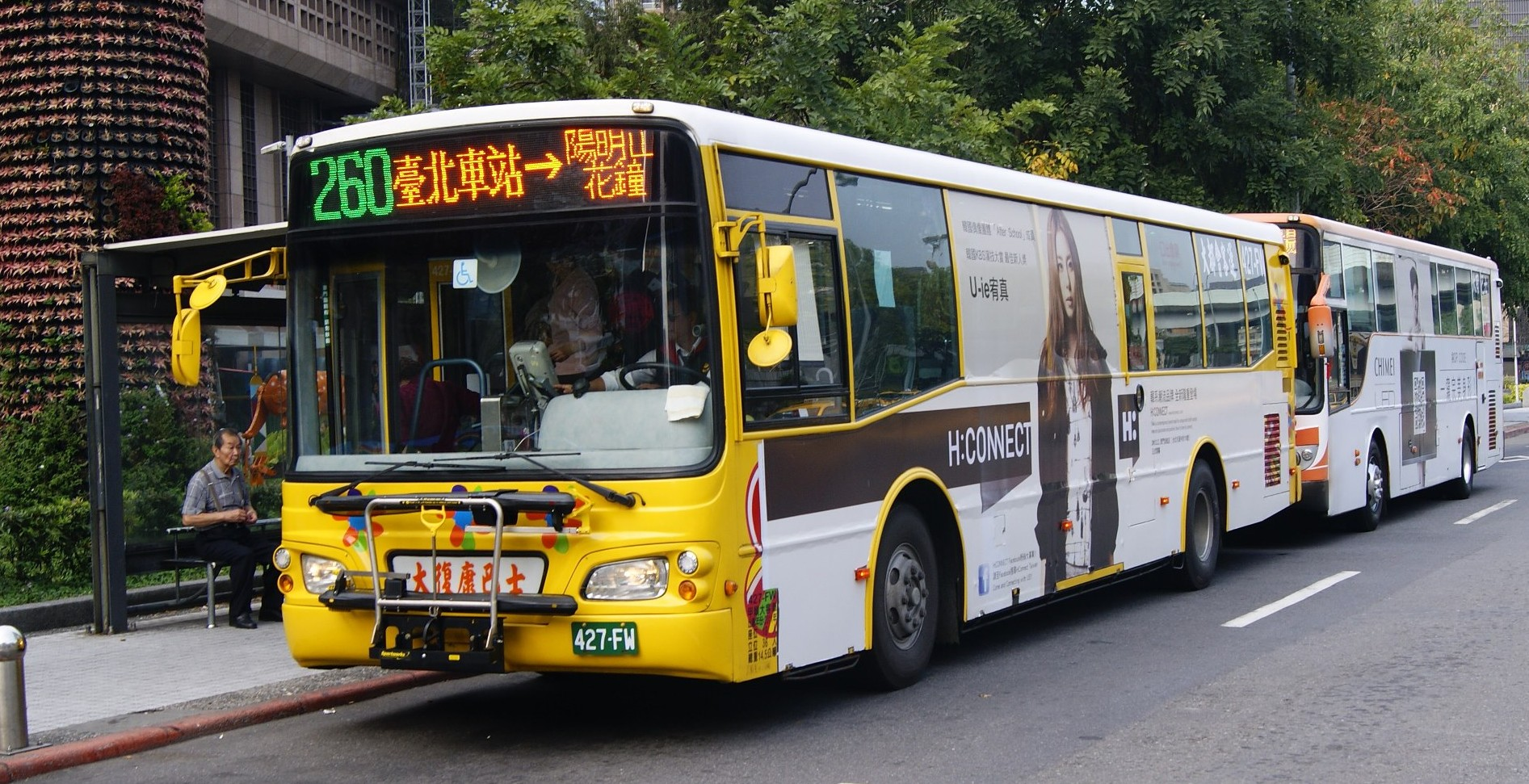 2011 HINO RK8JRSA 427-FW復康巴士加裝腳踏車架